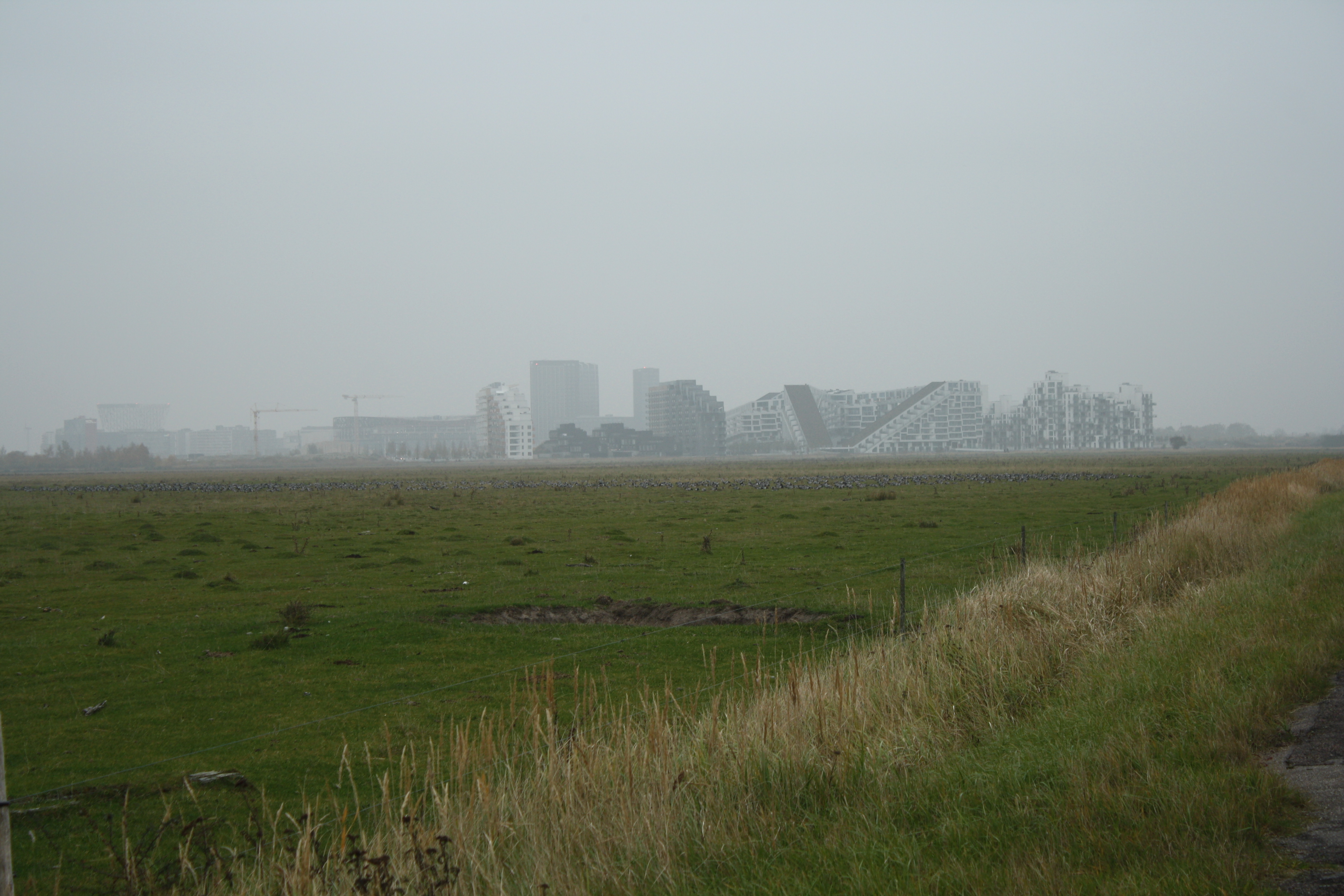 Kalvebod Fælled. Ørestad Syd i baggrunden.